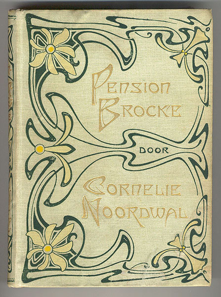 Boekomslag: Pension Brocke. 1e druk 1900. Auteur: C. Noordwal. Bandontwerp: W.F.A. Pothast. Uitgeverij: Cohen en Zonen